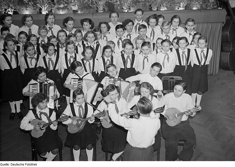 Original image description from the Deutsche Fotothek Auftritt eines Pionierensembles